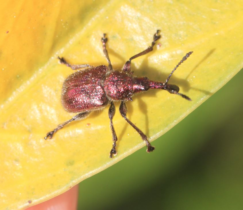 Goldgrüner Kirschfruchtstecher (Rhynchites auratus), Männchen, am 6. Mai 2020 nahe Heidelberg